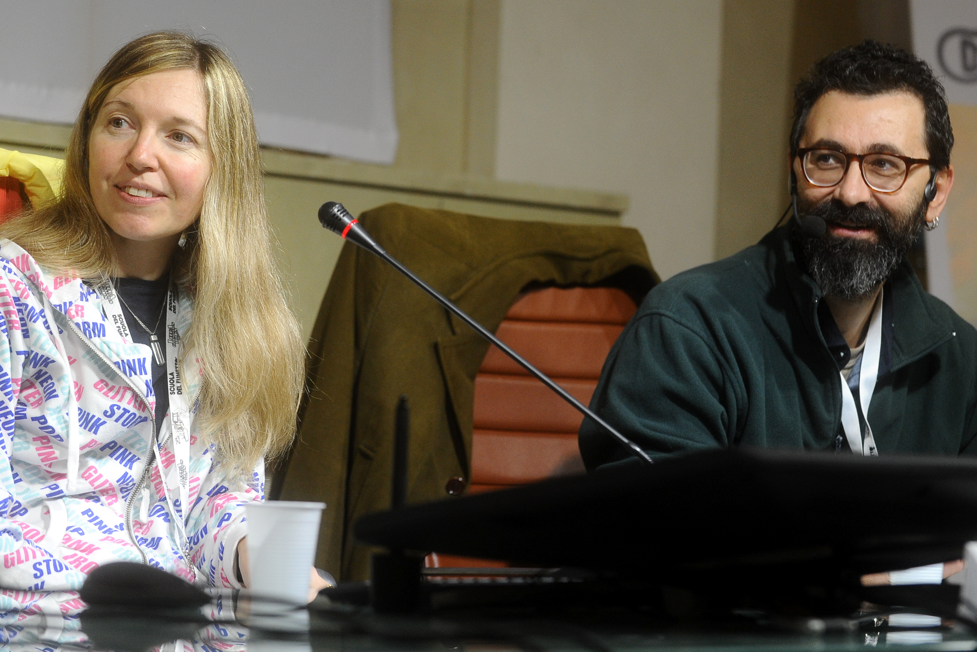 Teresa Radice e Stefano Turconi. Sala Tobino. Palazzo Ducale.